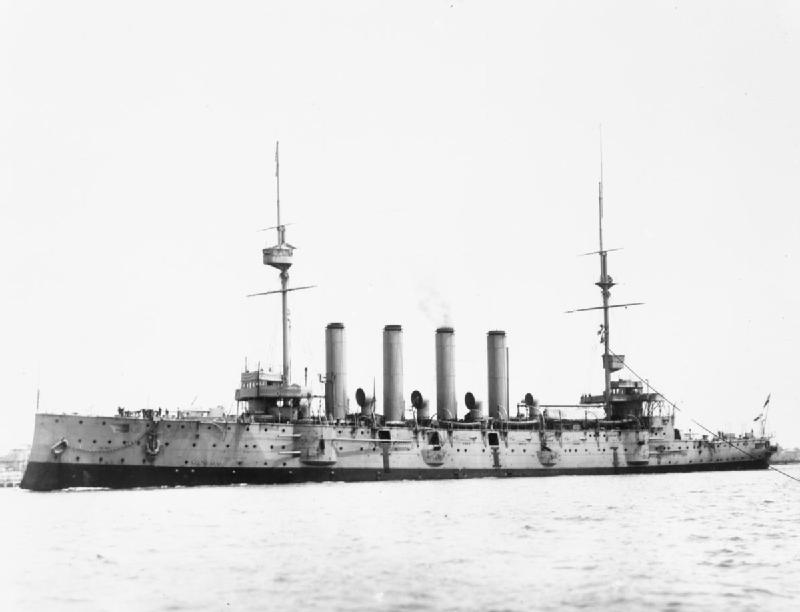 HMS ARIADNE.